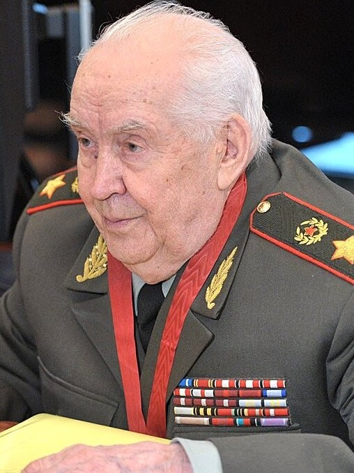 Гареев Махмут Ахметович